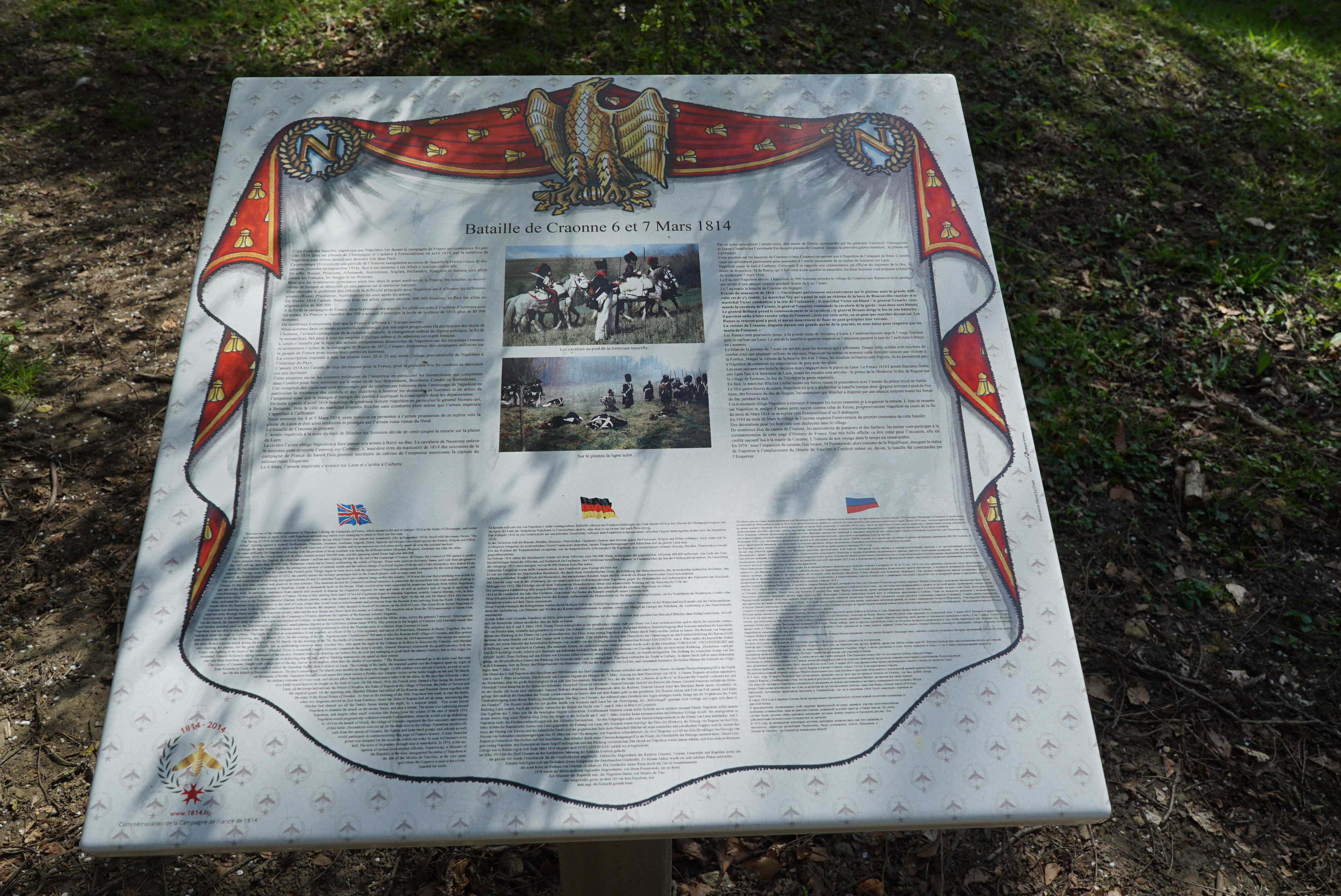 vue de la plaque au bi-centenaire de la Bataille de Craonne.